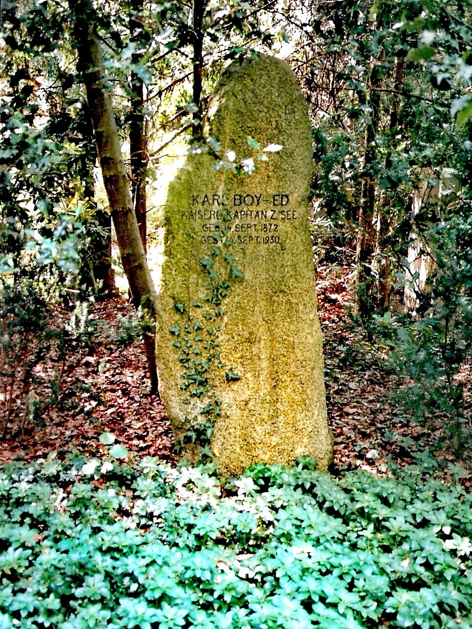 Lübecker Burgtorfriedhof; Grabmal Karl Boy-Ed, Grab wurde im Mai 2018 aufgelöst.